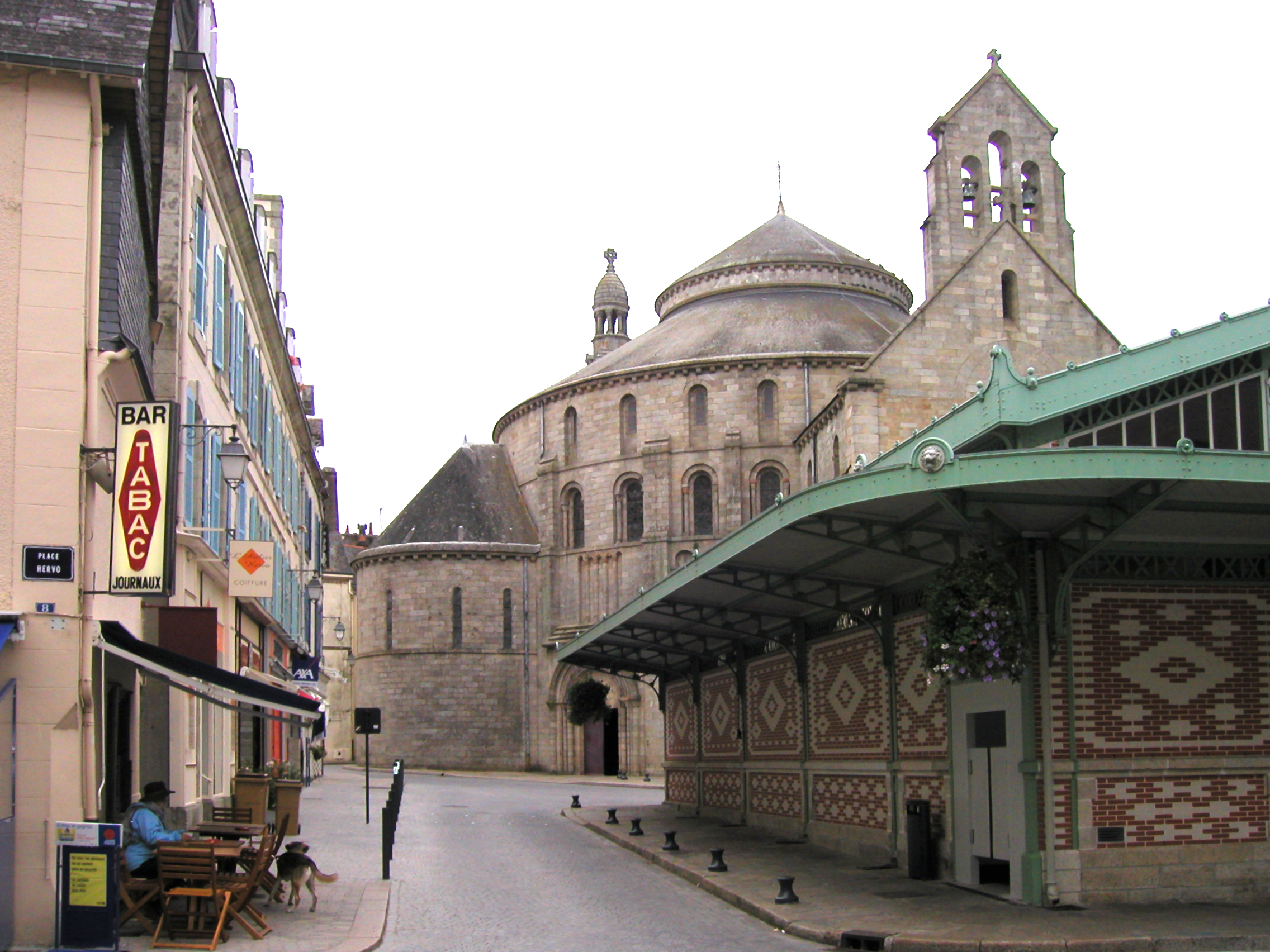 Kirche Sainte-Croix (11. Jh.) mit Markthalle in Quimperlé (Finistère, France